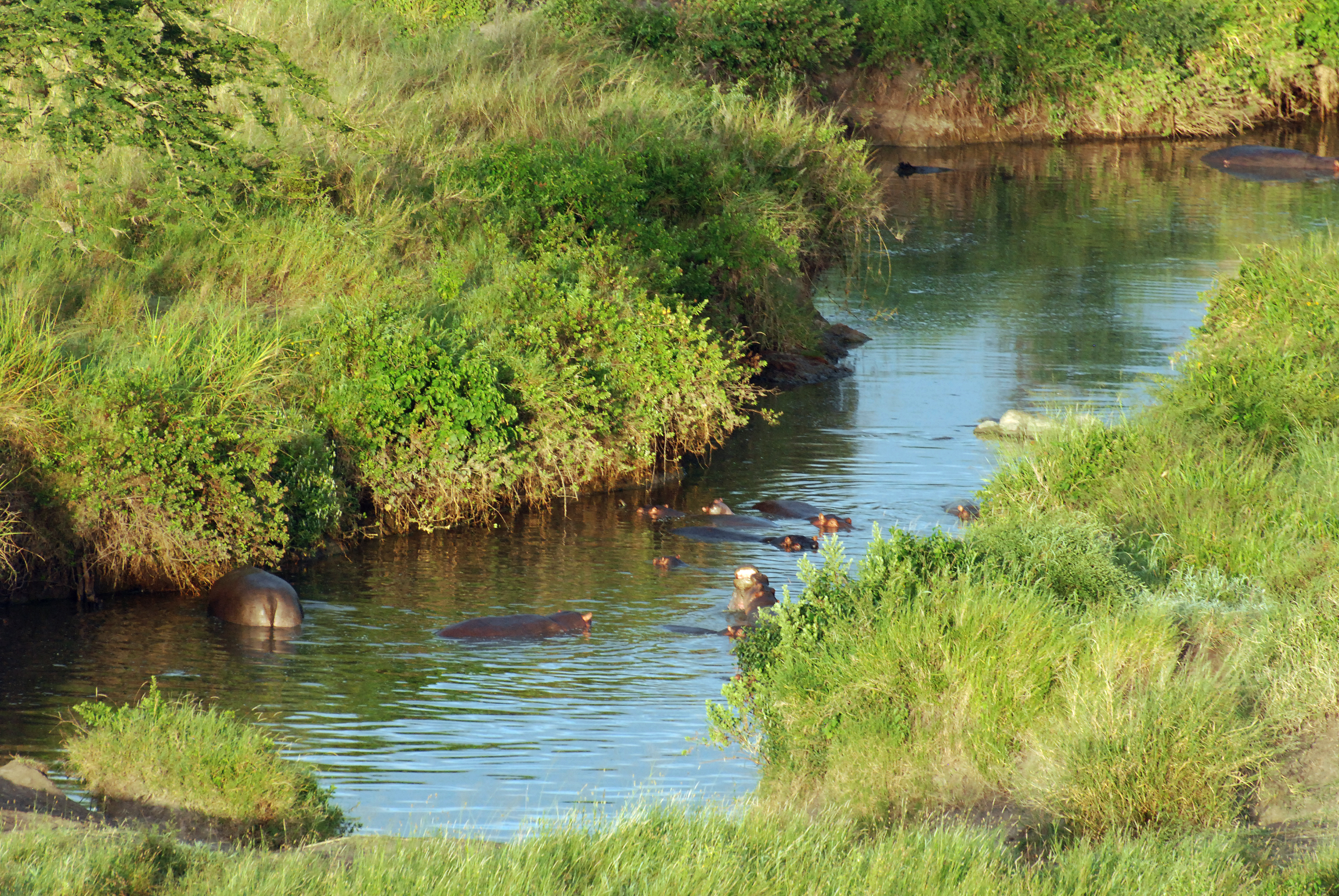 Hippo Pool